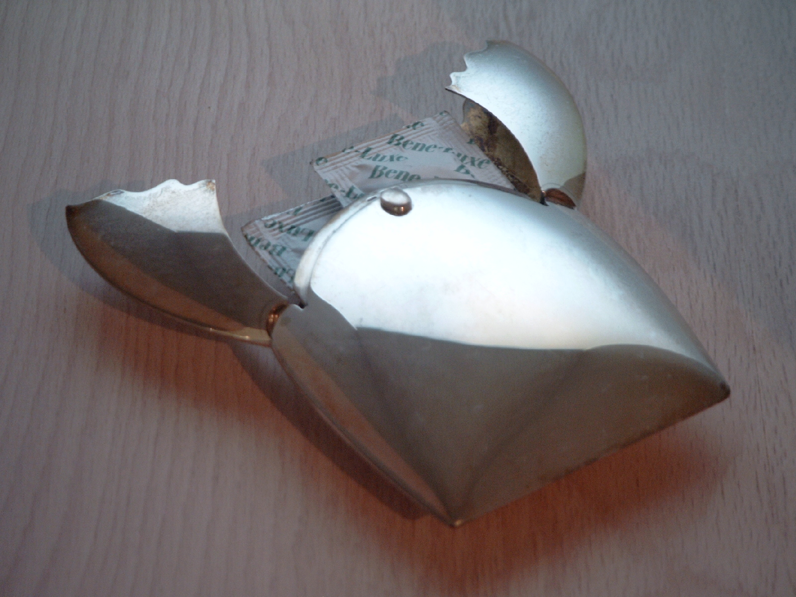 Condoomhouder (1992) Ontwerp Nedda El-Asmar